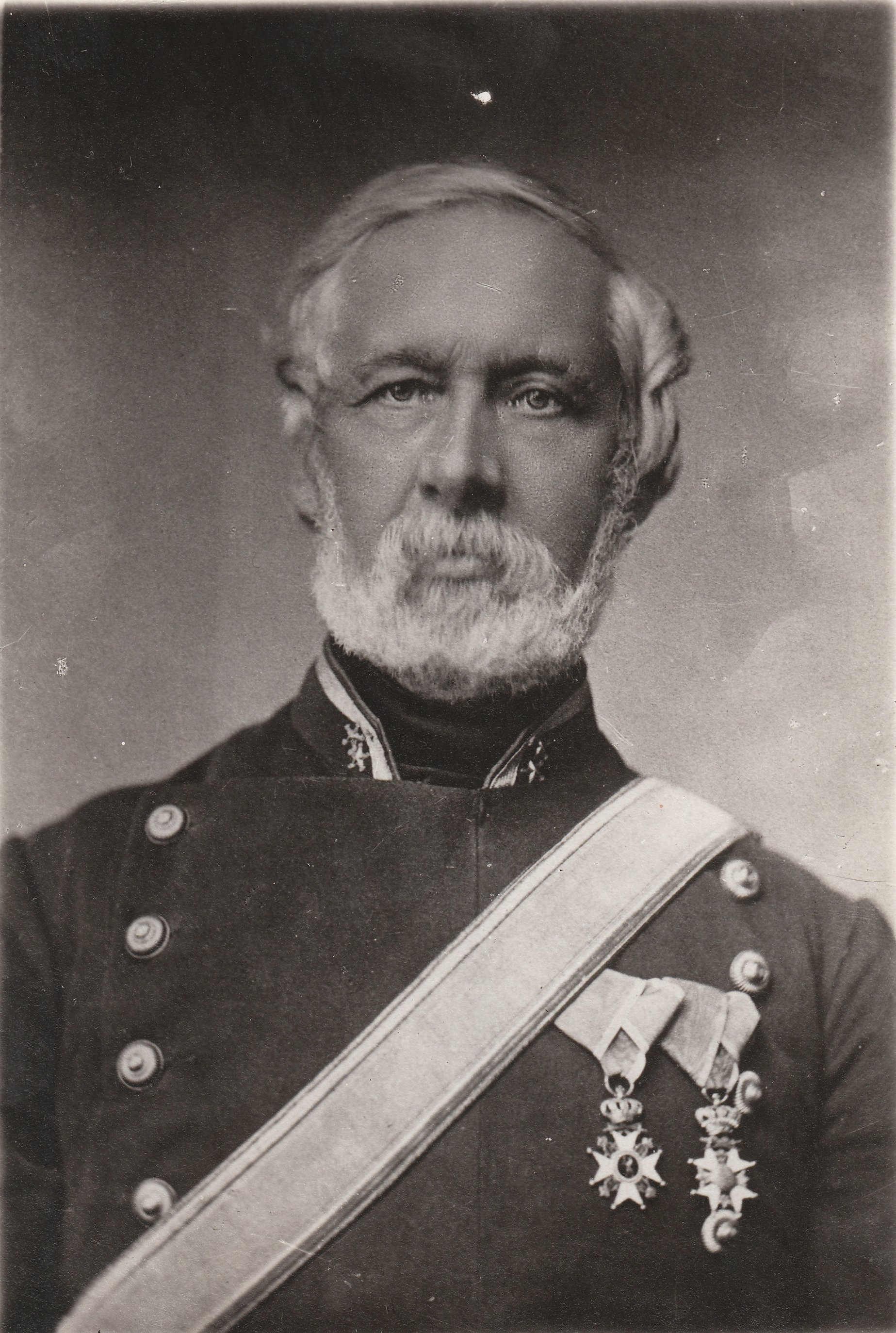 Format: Fotopositiv. I 1875 bodde oberstløytnant og enkemann Søren Christian Gjessing i Dronningens gate 26 i Trondhjem sammen med sin datter Alma Gjessing (f. 1843 i Christiania). Han hadde også en tjenestepike Martha Johnsen (f. 1835) fra Tiller og to kurvmakerlærlinger i sin tjeneste. Kilde: Folketellingen i 1875